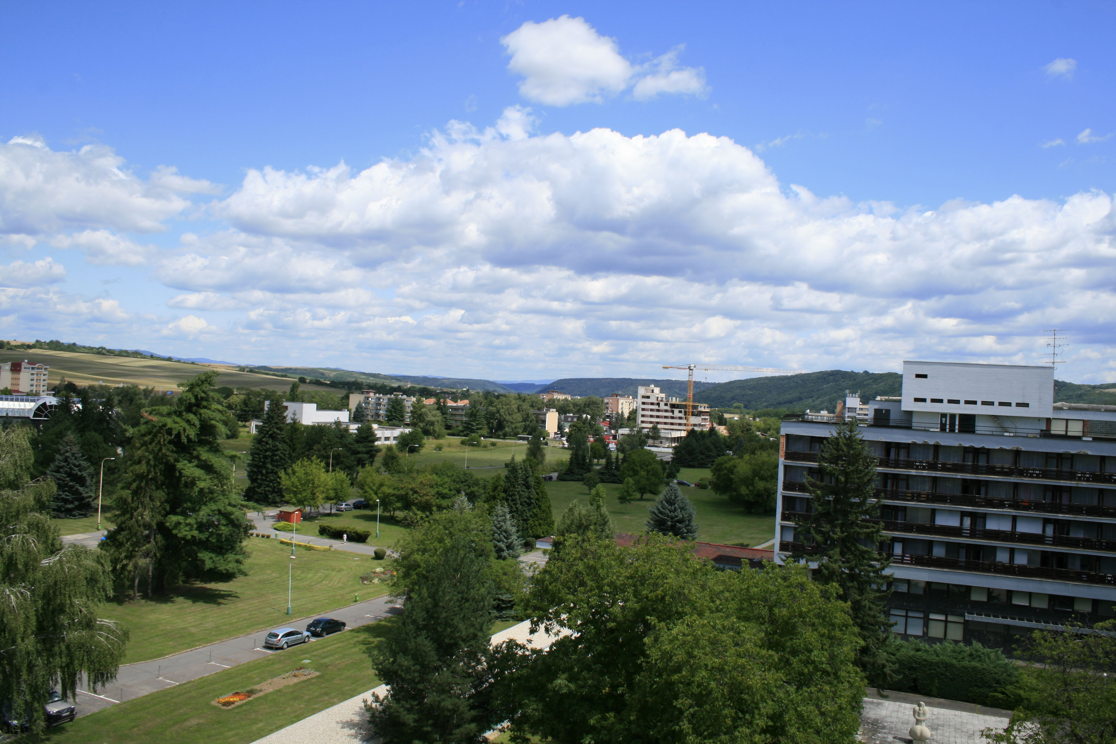 Letná atmosféra v kúpeľnom areáli